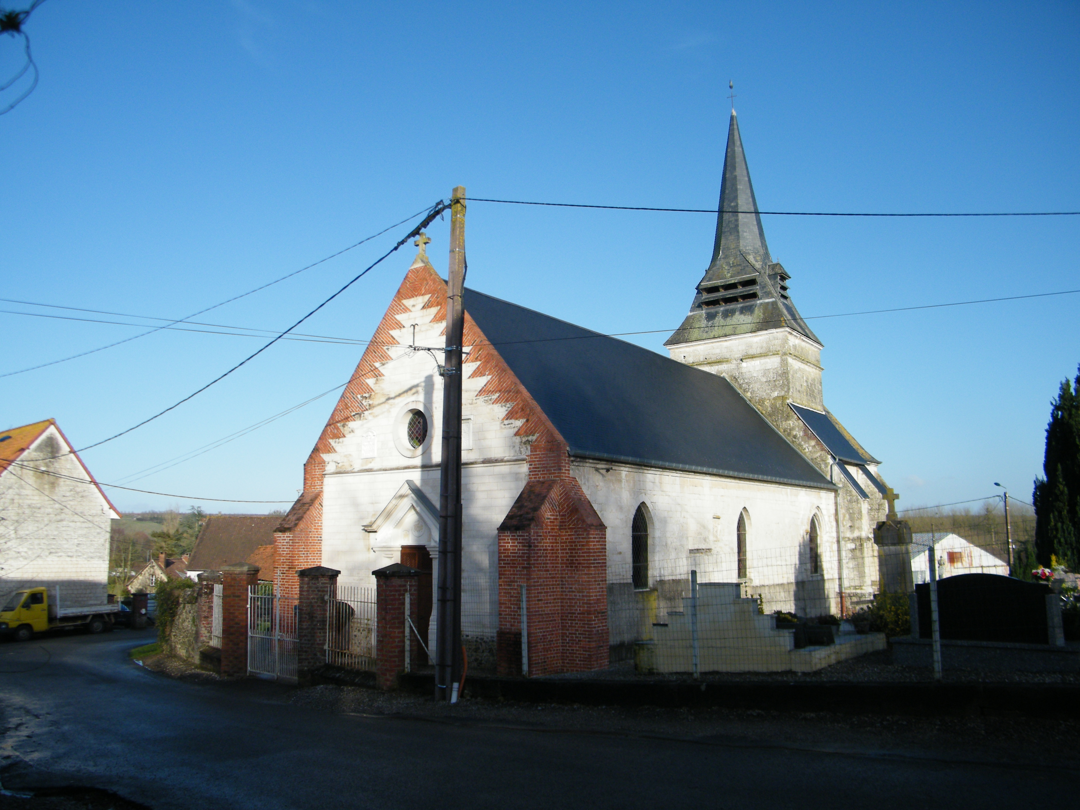 L'église.